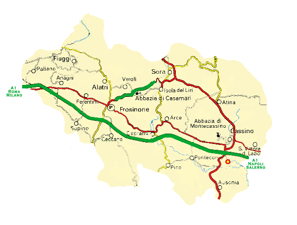 Immagine della provincia di Frosinone